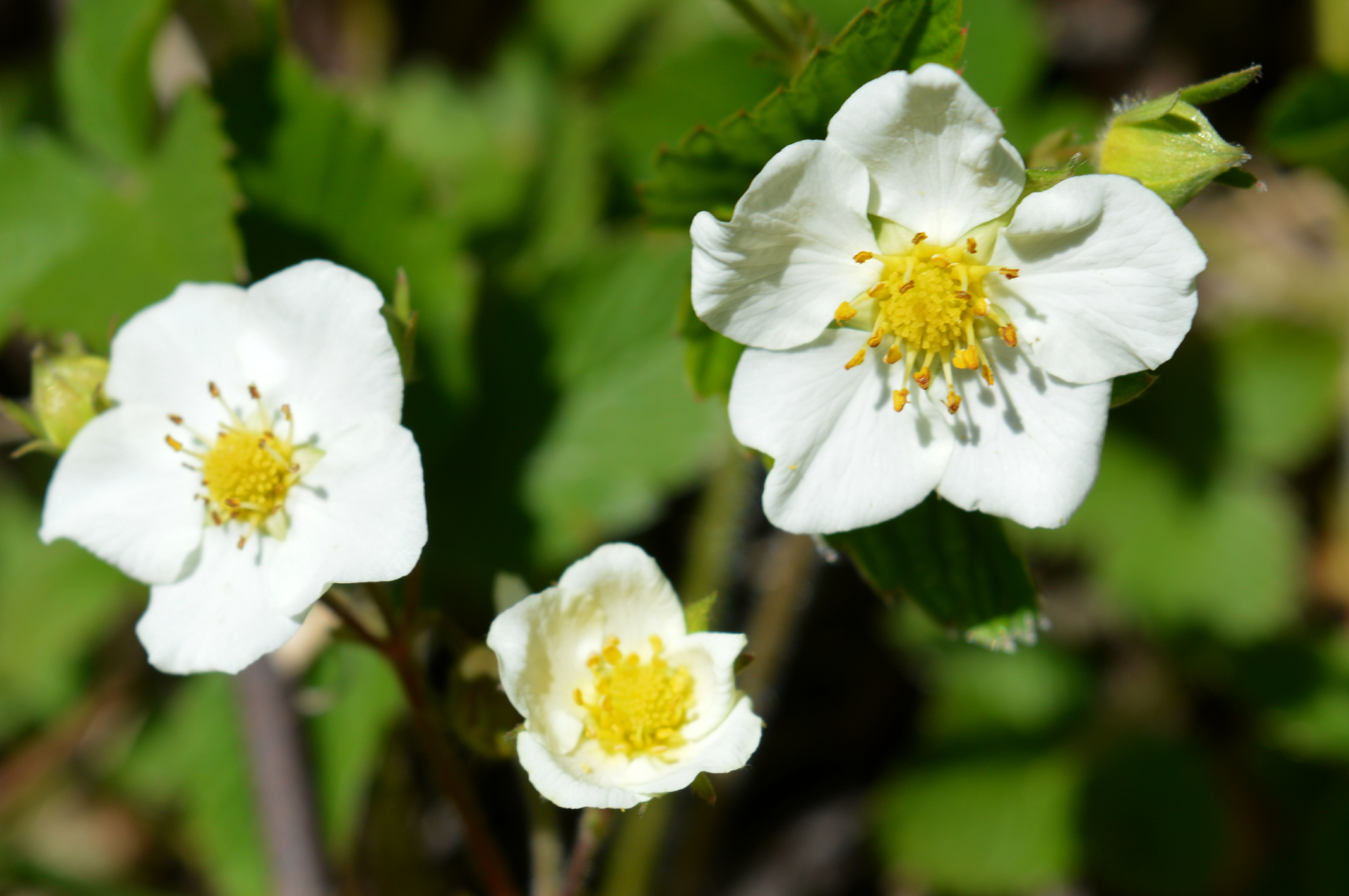 Landschaftsschutzgebiet Röderhofer Teiche und Egenstedter Forst - Walderdbeere (Fragaria vesca)